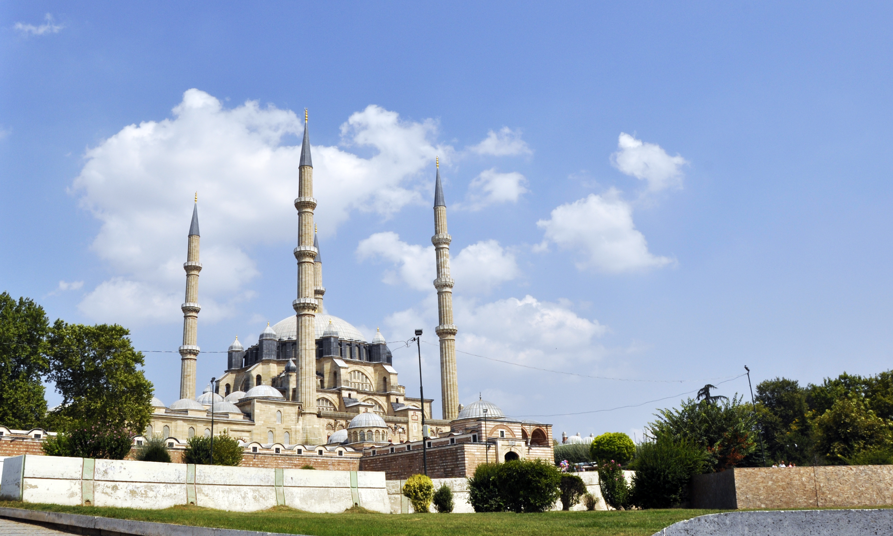 Selimiye Camii